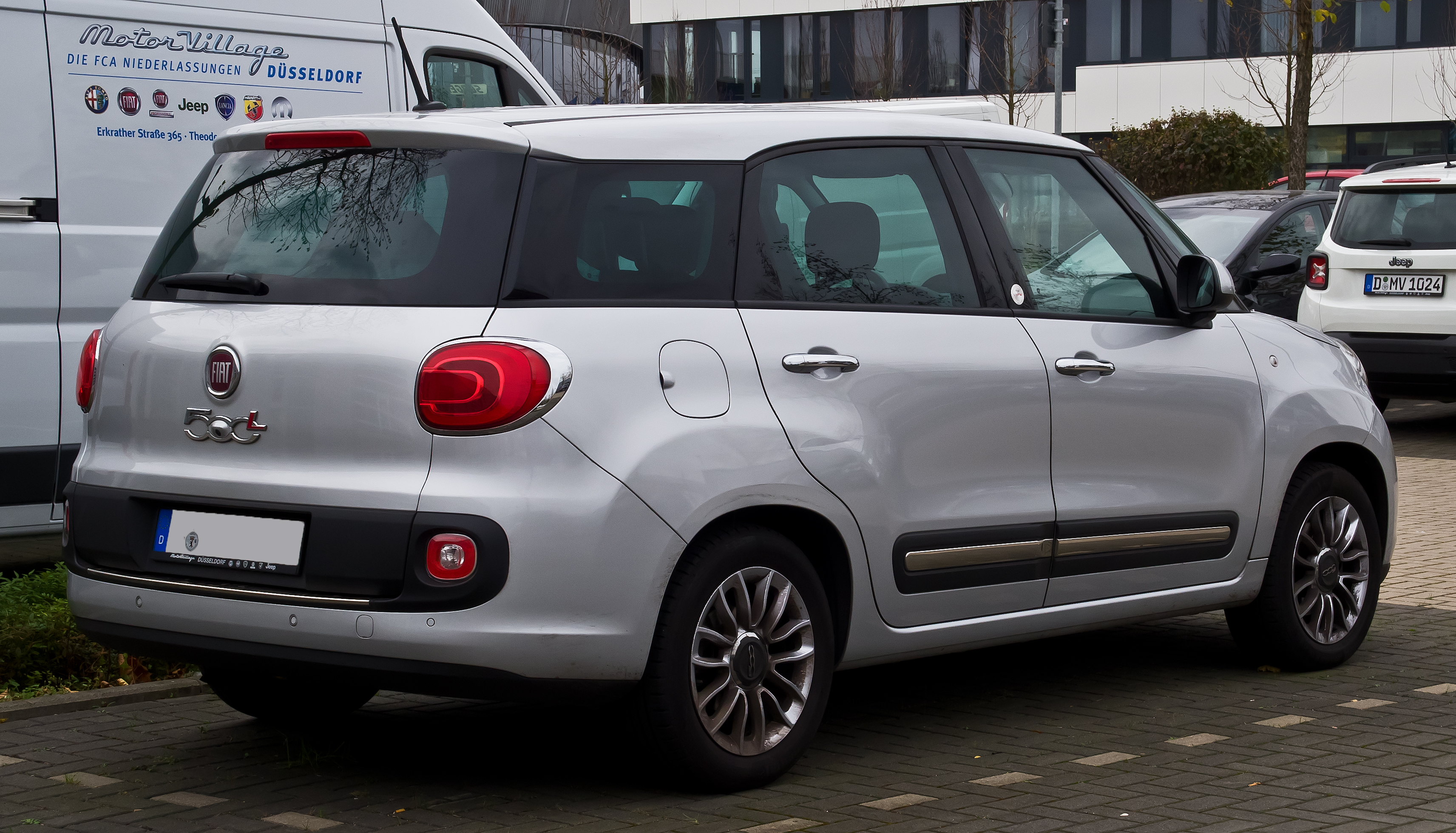 Fiat 500L Living 1.3 16V Mutlijet Lounge